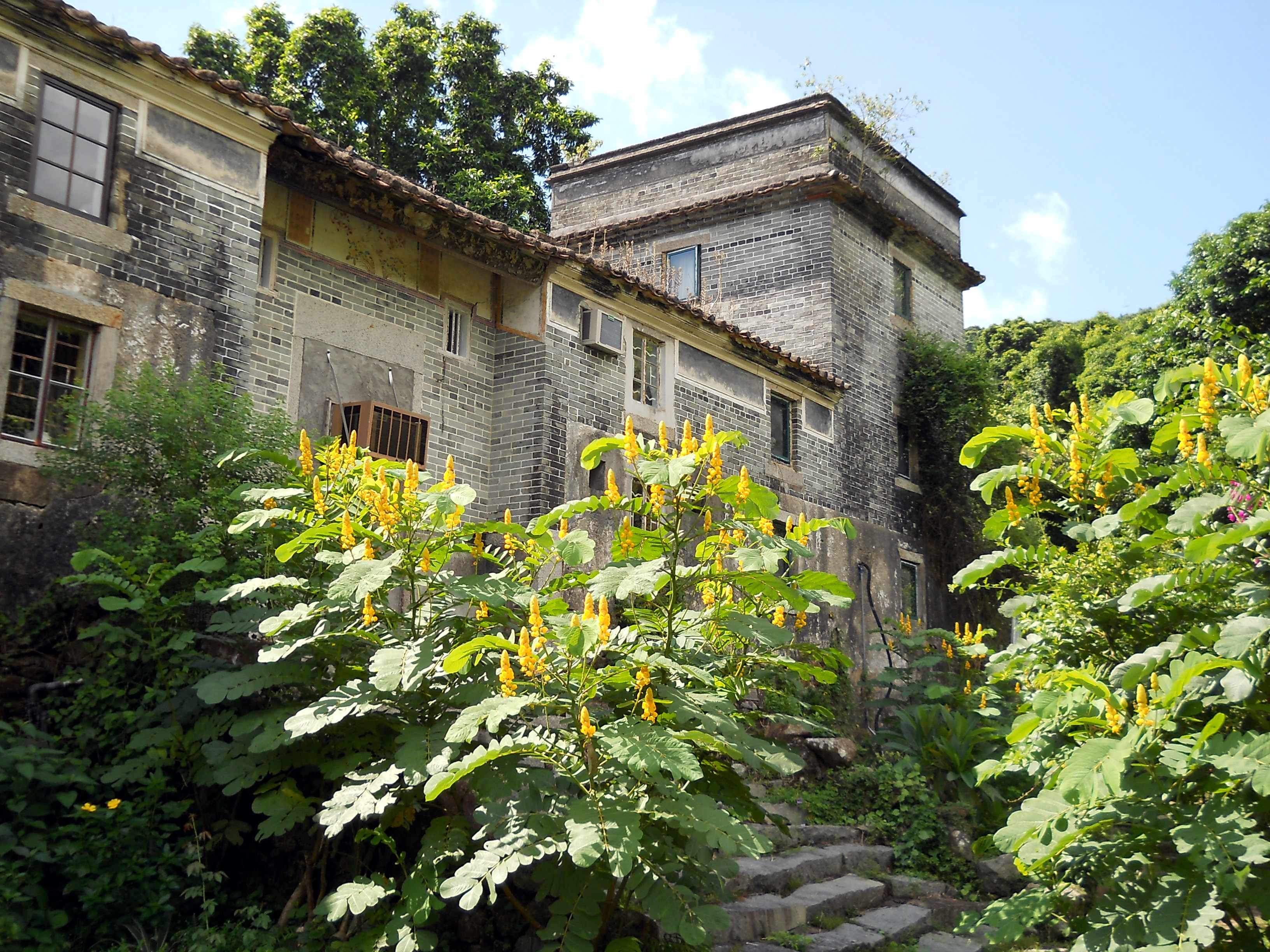 中文（香港）: 白沙澳何氏舊居更樓